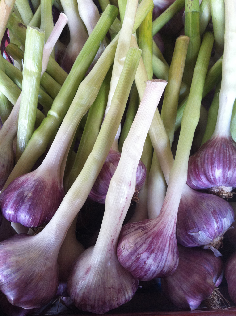 שום סגול טרי בתקופת הפסח